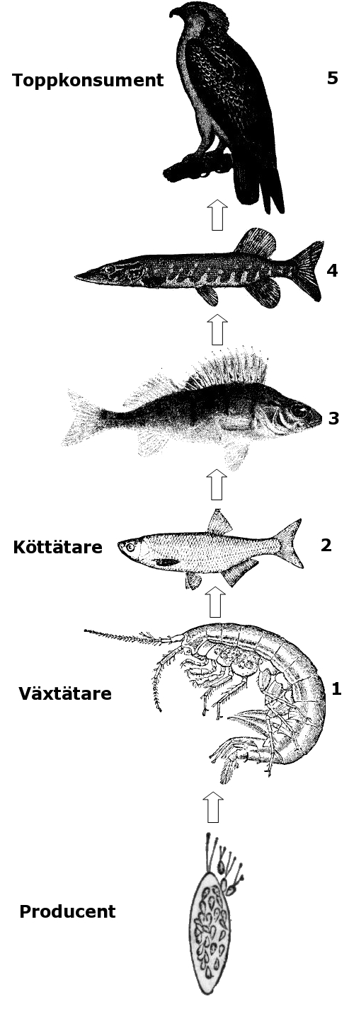 Näringskedja